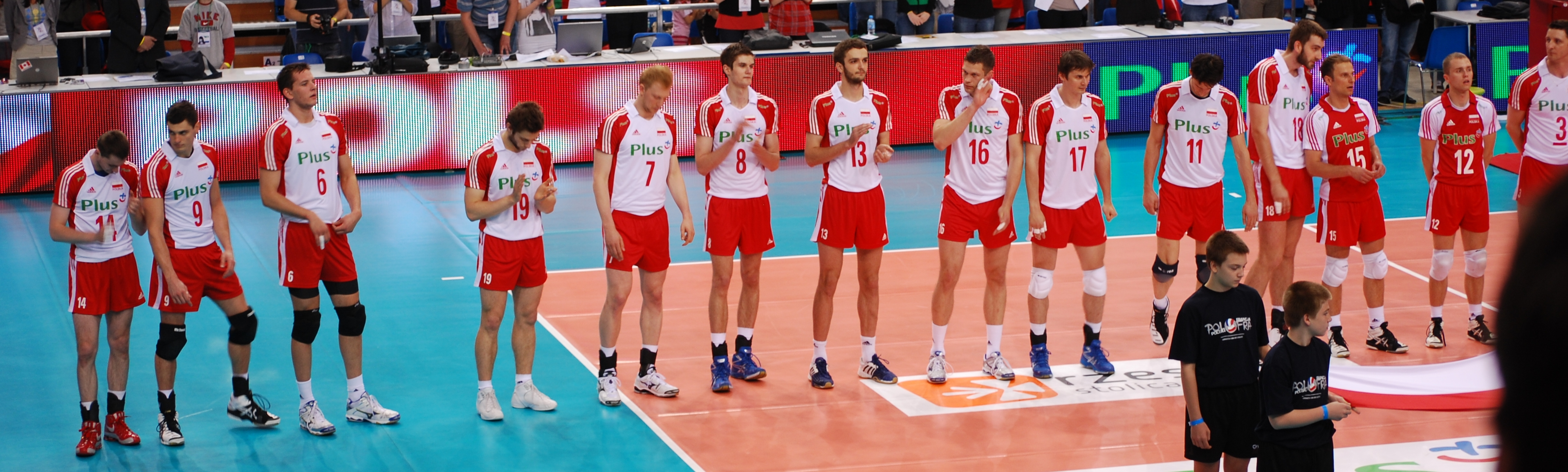 Reprezentacja Polski w piłce siatkowej mężczyzn przed meczem towarzyskim z Francją, na hali Podpromie w Rzeszowie. Od lewej stoją: 14. Michał Ruciak 9. Zbigniew Bartman 6. Bartosz Kurek 19. Grzegorz Łomacz 7. Jakub Jarosz 8. Karol Kłos 13. Mateusz Mika 16. Patryk Czarnowski 17. Michał Bąkiewicz 11. Łukasz Żygadło 18. Marcin Możdżonek 15. Piotr Gacek 12. Paweł Zatorski 3. Piotr Gruszka